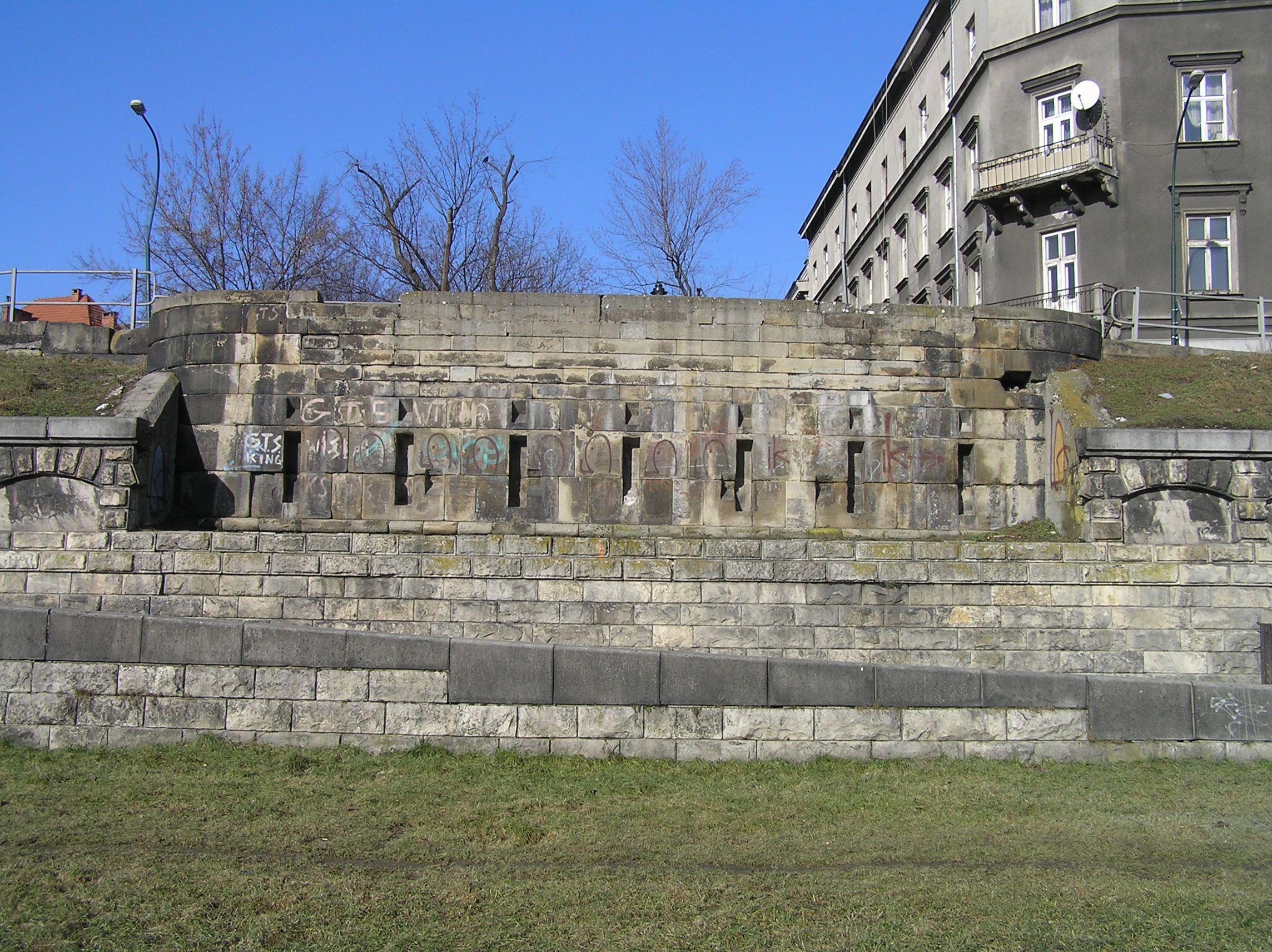 Przyczółek północny Mostu Podgórskiego w Krakowie. Od 2010 wykorzystywany po raz kolejny, tym razem dla kładki pieszo-rowerowej.